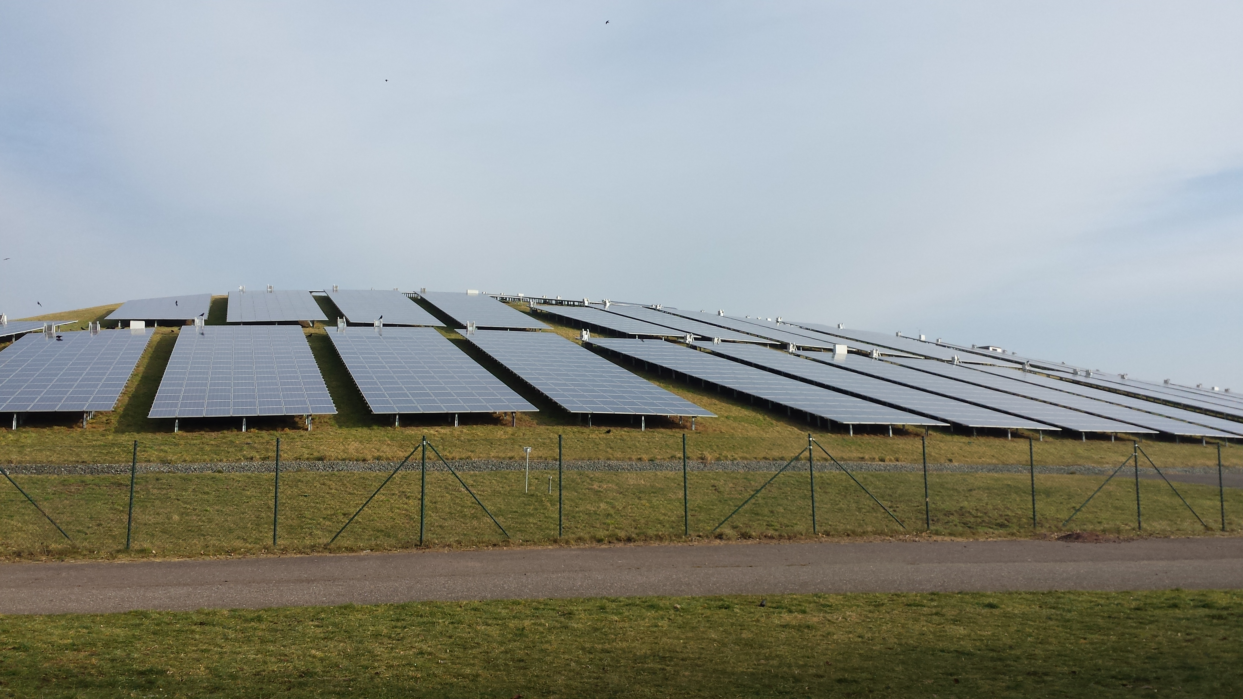 Solarpark Magdeburg - Photovoltaikanlage